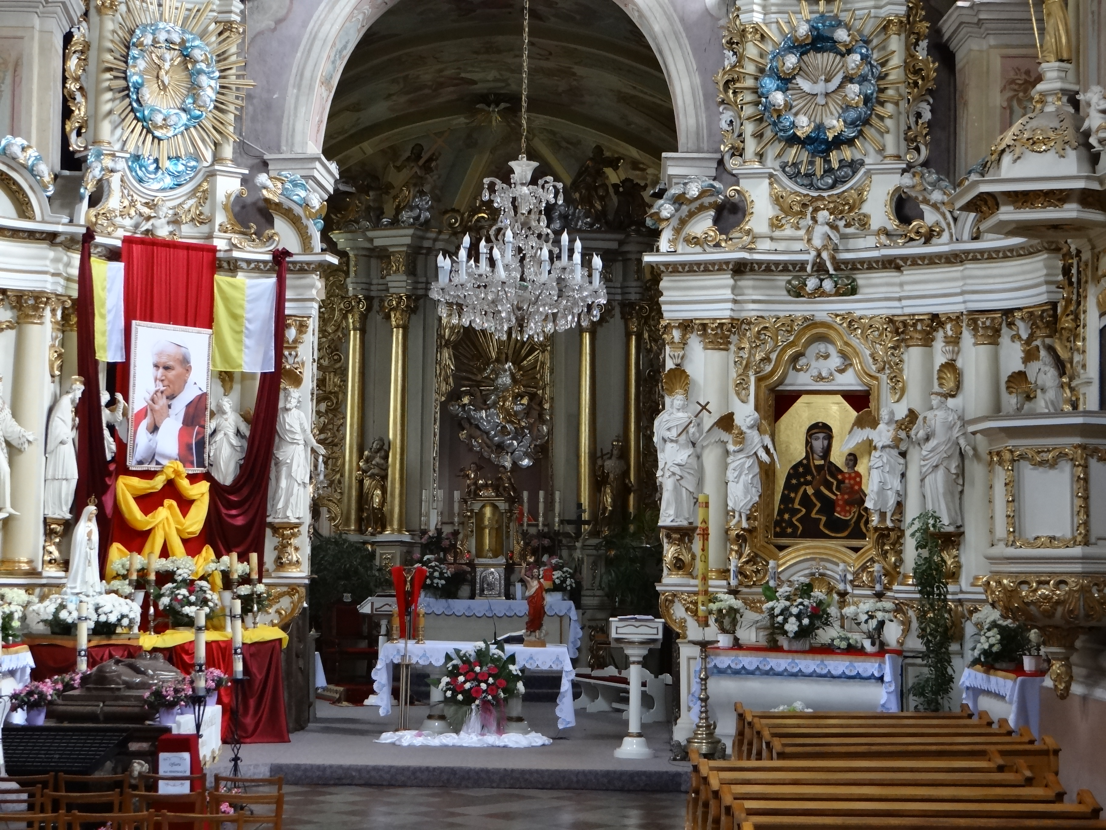 Klasztor oo. Bernardynów w Warcie.